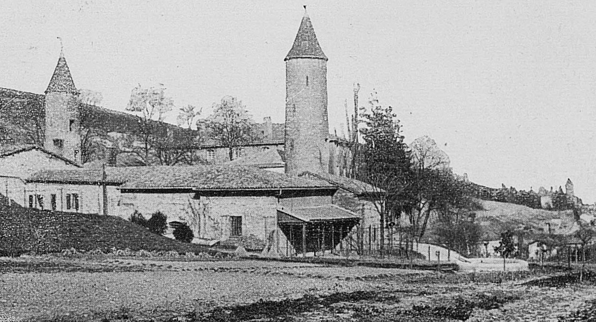 Dictionnaire illustré des communes du département du Rhône. Tome 1 / par MM. E. de Rolland et D. Clouzet.